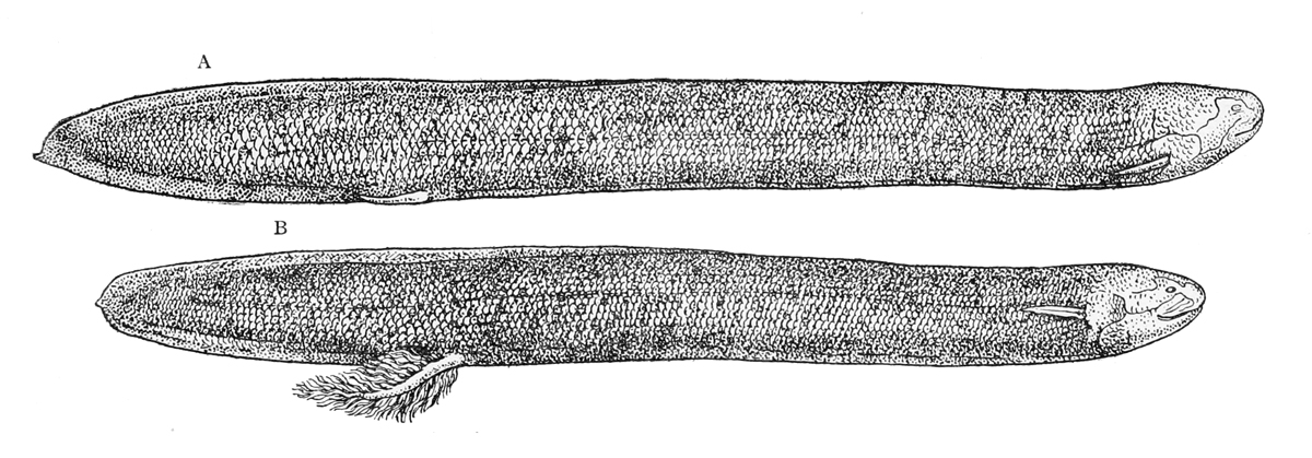 Lepidosiren paradoxaA.Female B.Male